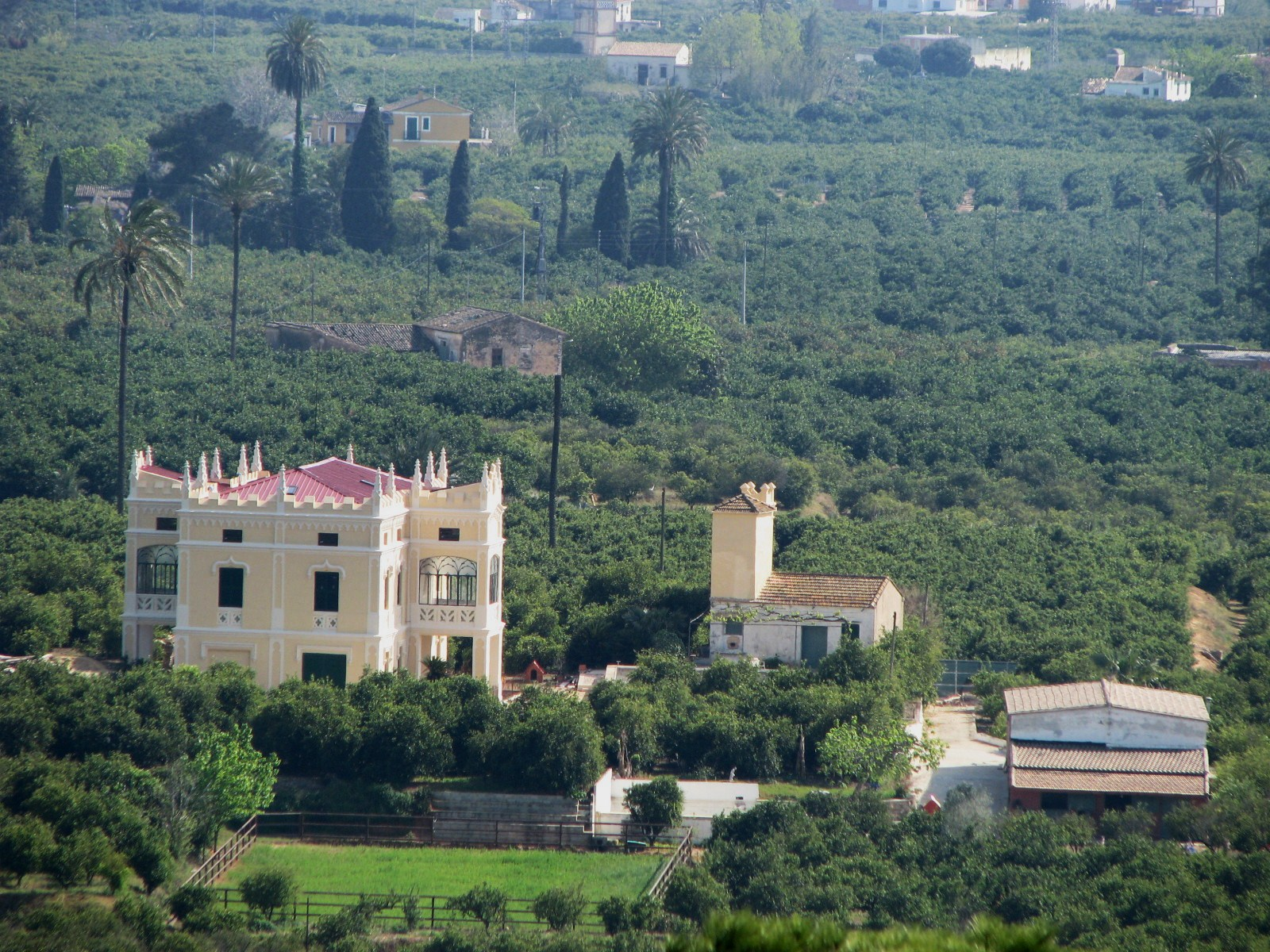 Huertos de Naranjos (Alcira)